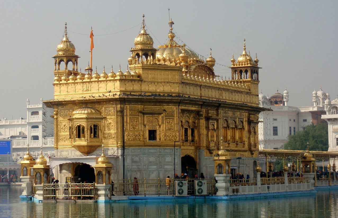 Kultainen Temppeli Amritsarissa